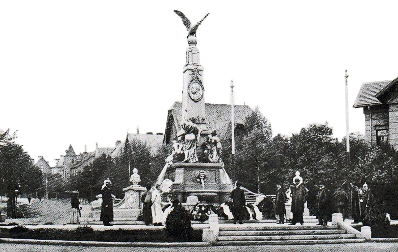 Wien-Währing, Erzherzog-Karl-Ludwig-Denkmal von Edmund Hofmann von Aspernburg (1906)